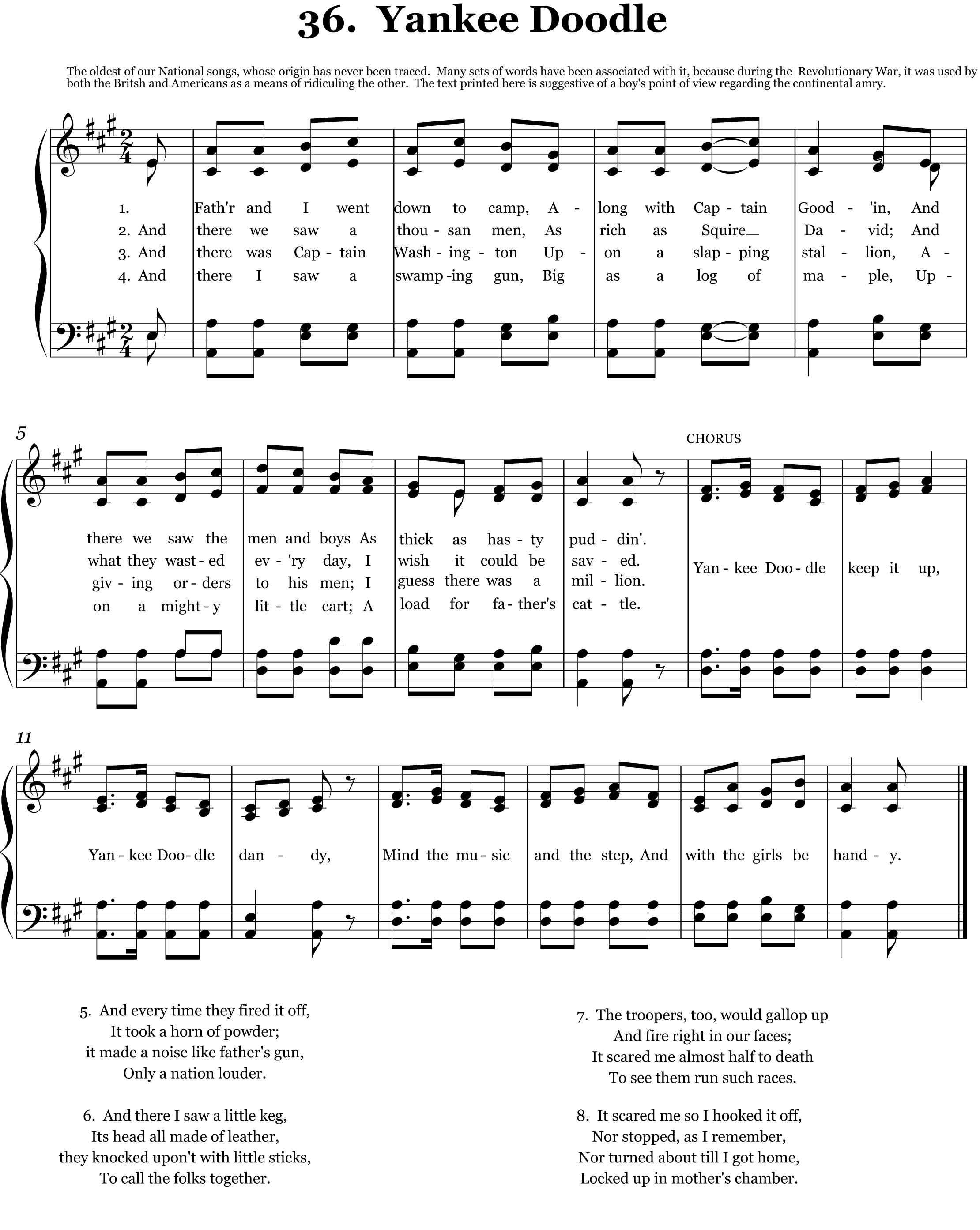 Notenblatt zu Yankee Doodle.